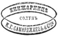 Лого на печатницата на Коне Самарджиев.